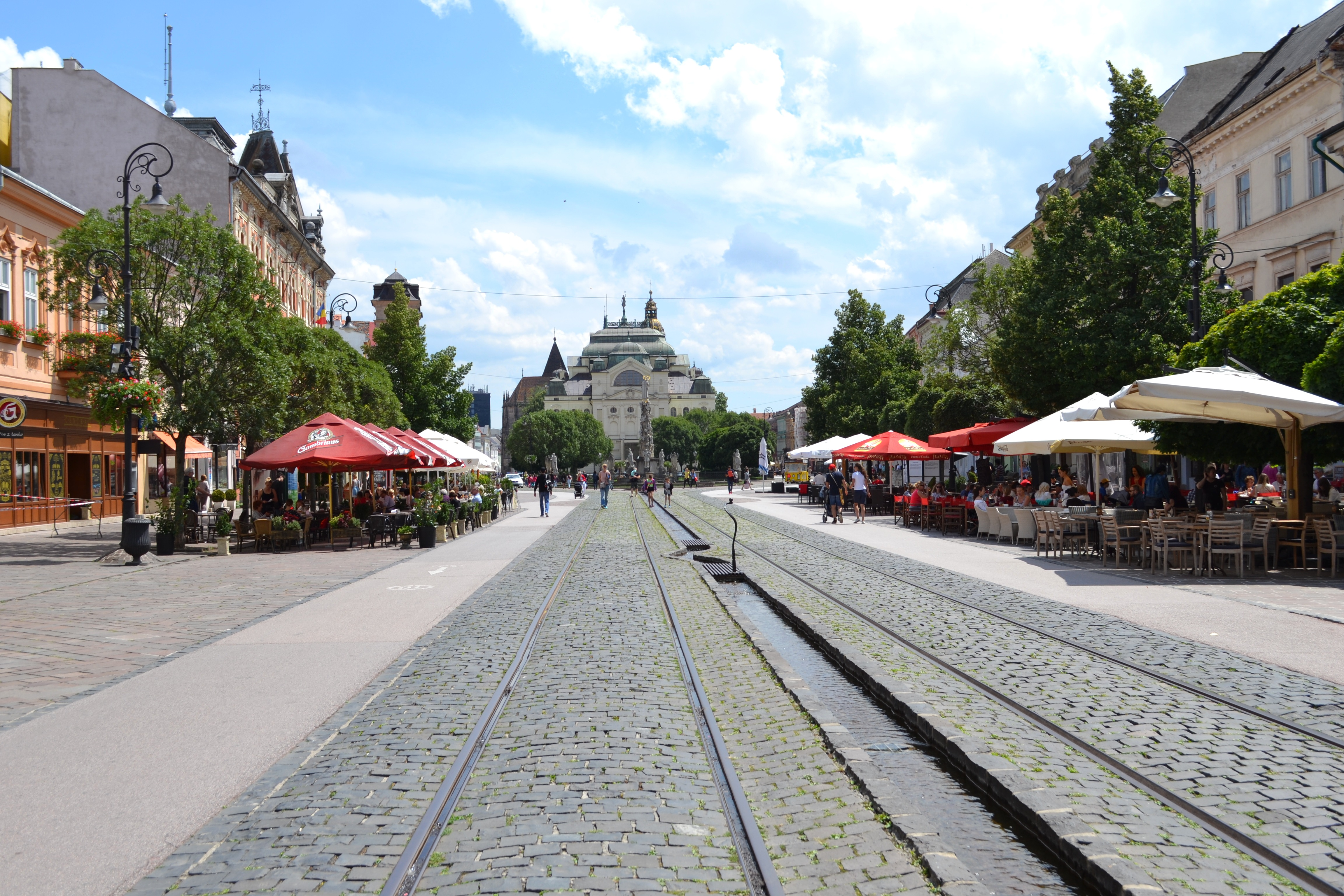 Hlavná ulica v Košiciach